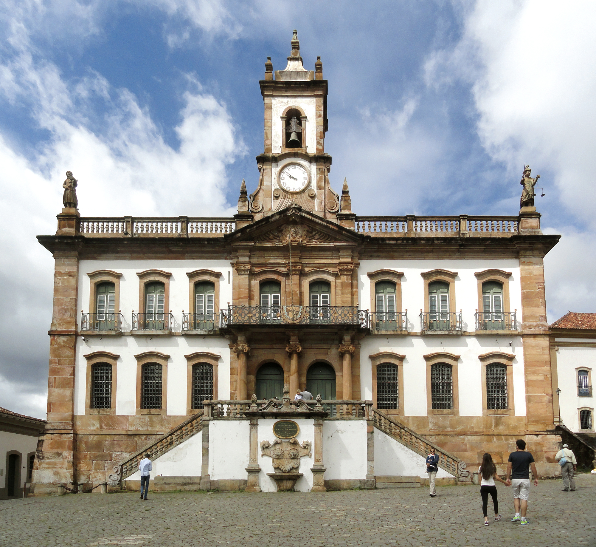 Casa à Praça Tiradentes, antiga Câmara e Cadeia, atual Museu da Inconfidência